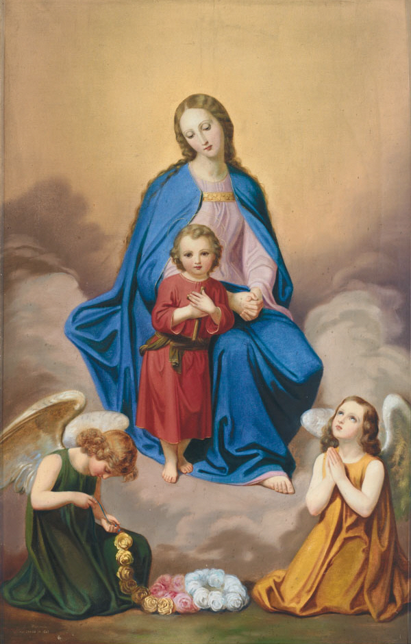 Altarbild Madonna mit Kind und adorierenden Engeln, 1865, Öl auf Lwd. 120 x 74,5 cm